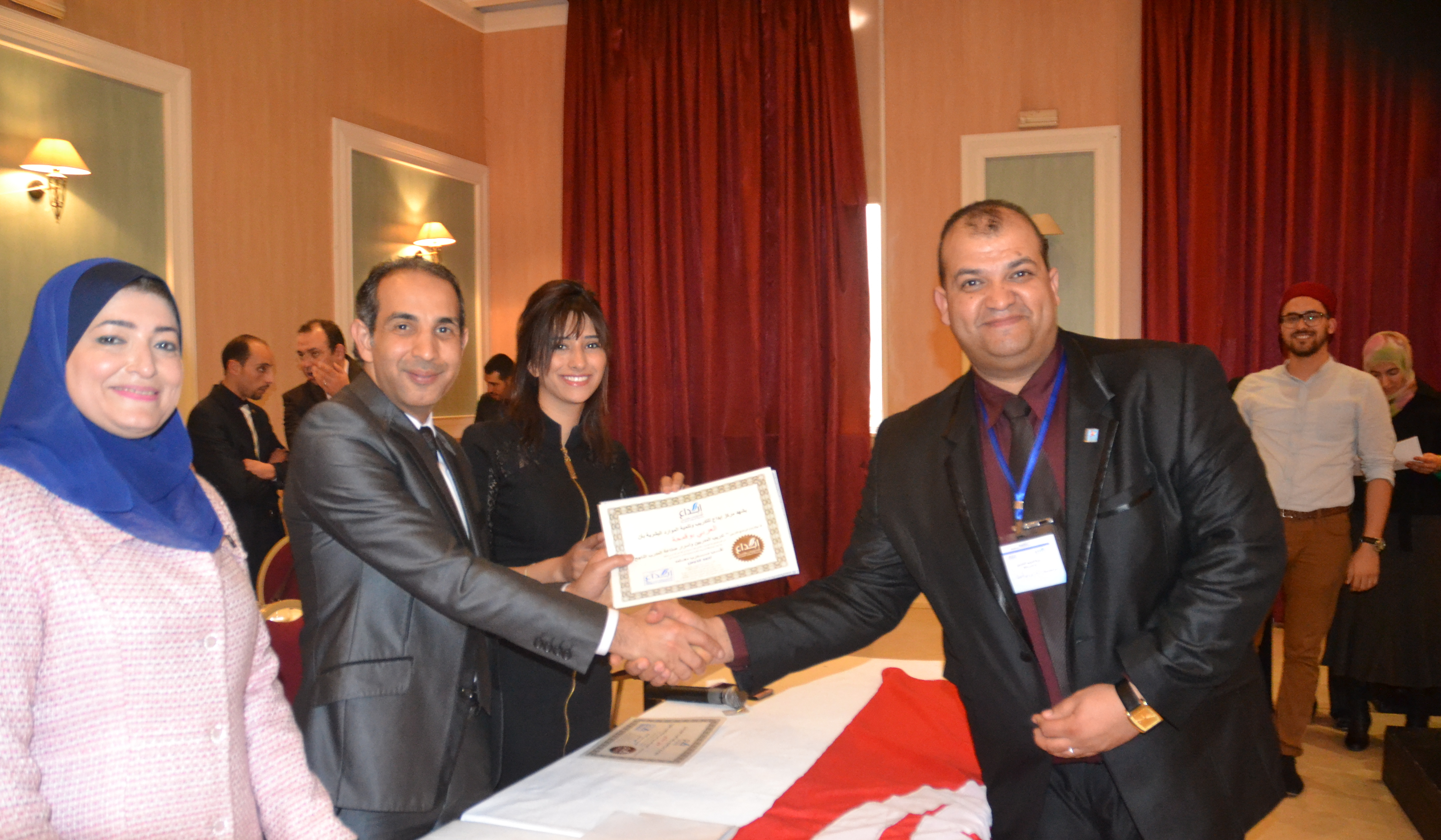 شهادة مدرب معتمد دولي من قبل الاستاذ أحمد قدوس